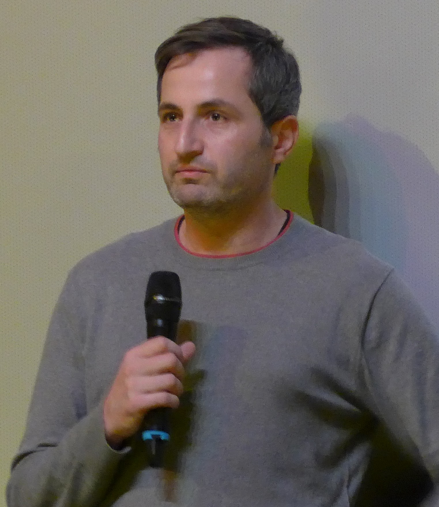 Fabian Massah nach der Vorführung von "Auf Einmal" auf der Berlinale 2016